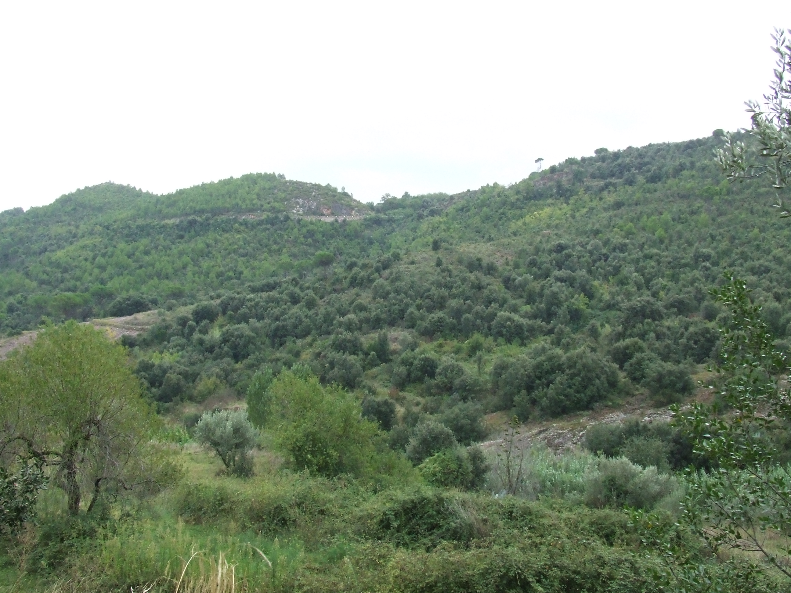 La carretera BP-1432 en terme de Bigues i Riells (Vallès Oriental)